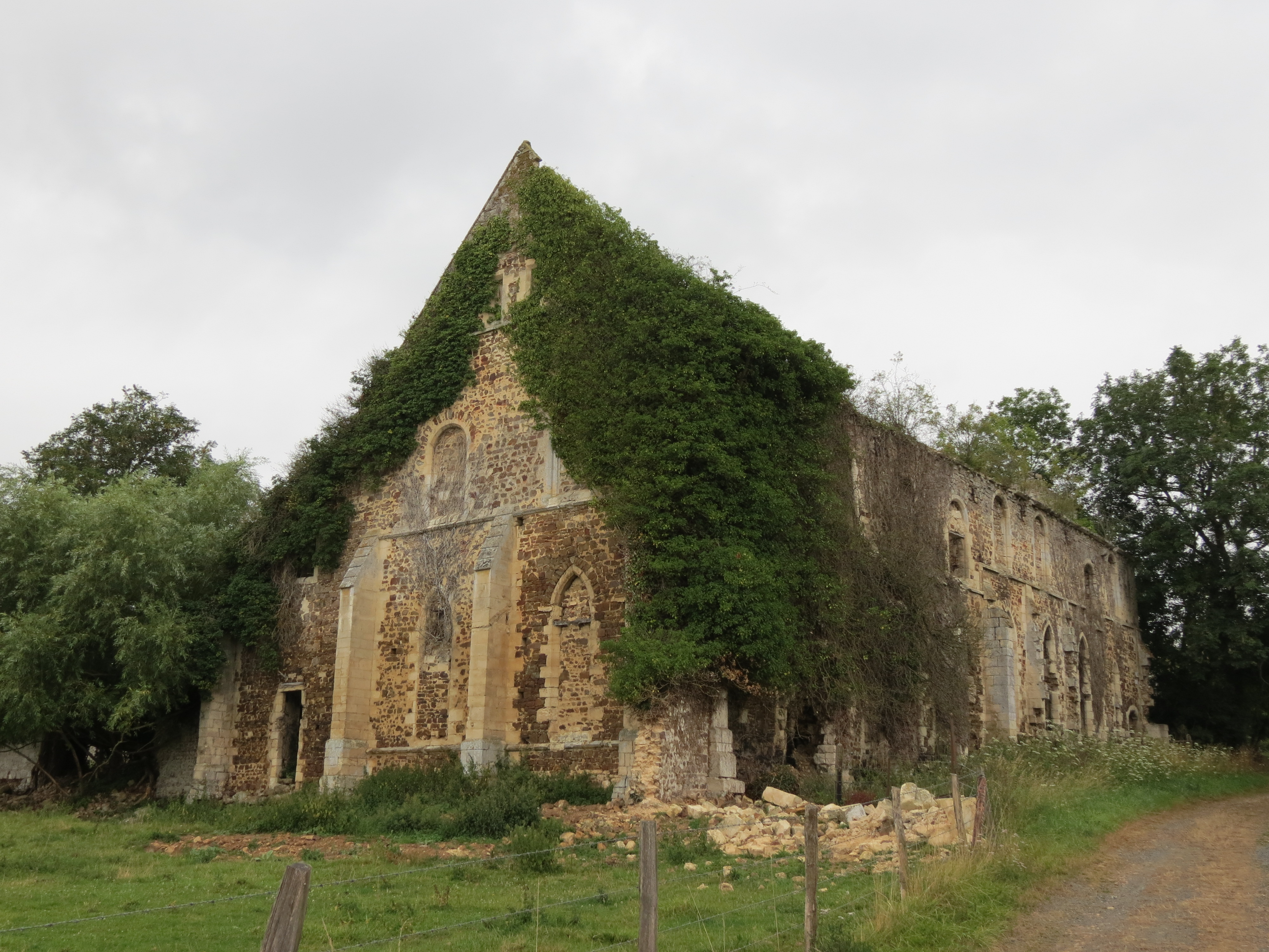 Ancienne abbaye de Barbery.